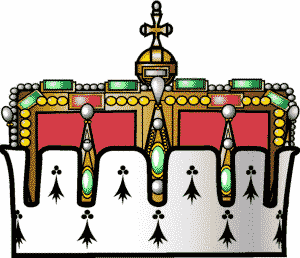 Erzherzogs Crown